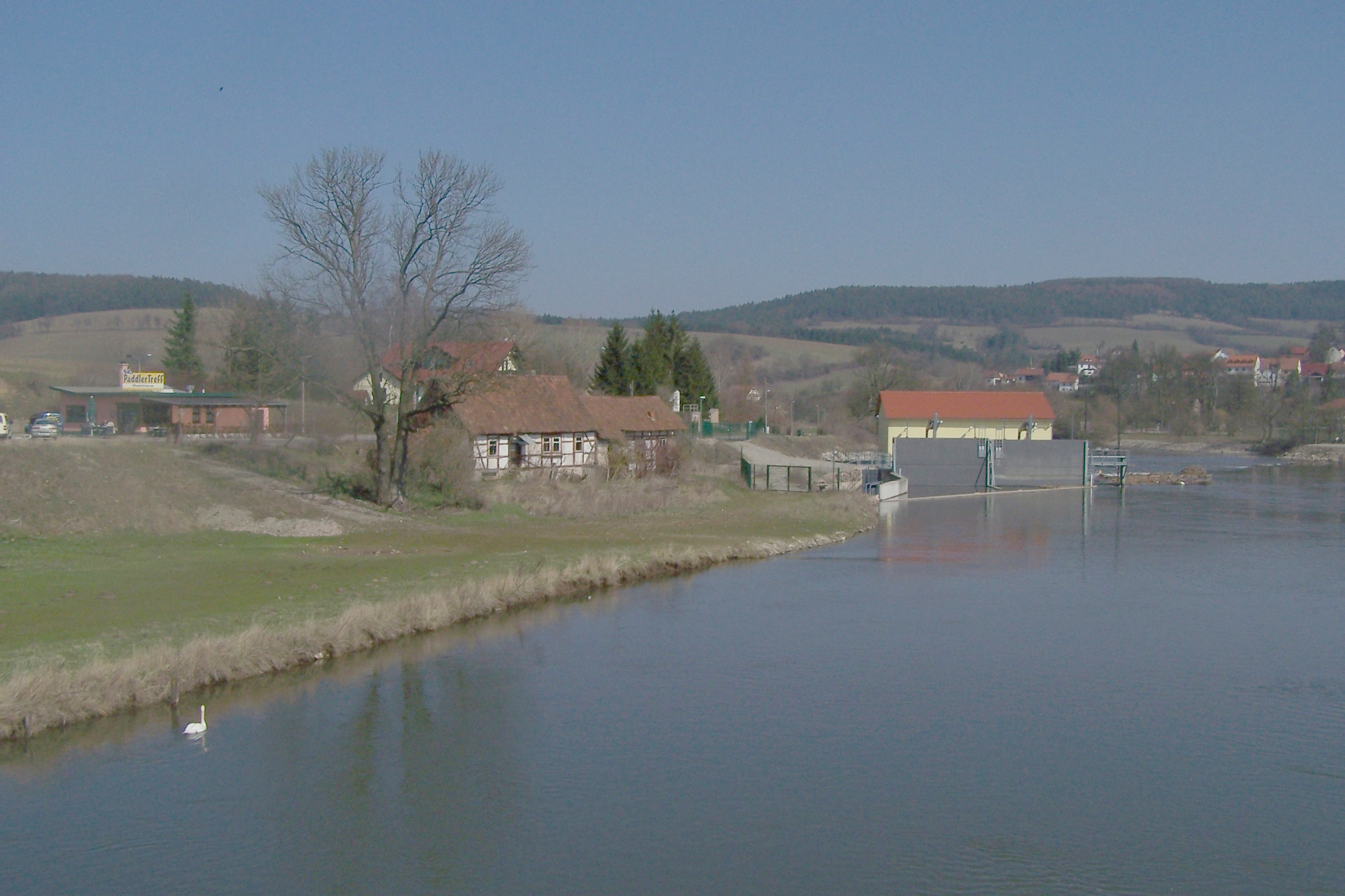 An der Werra in Mihla. Ehem. Fährhaus.